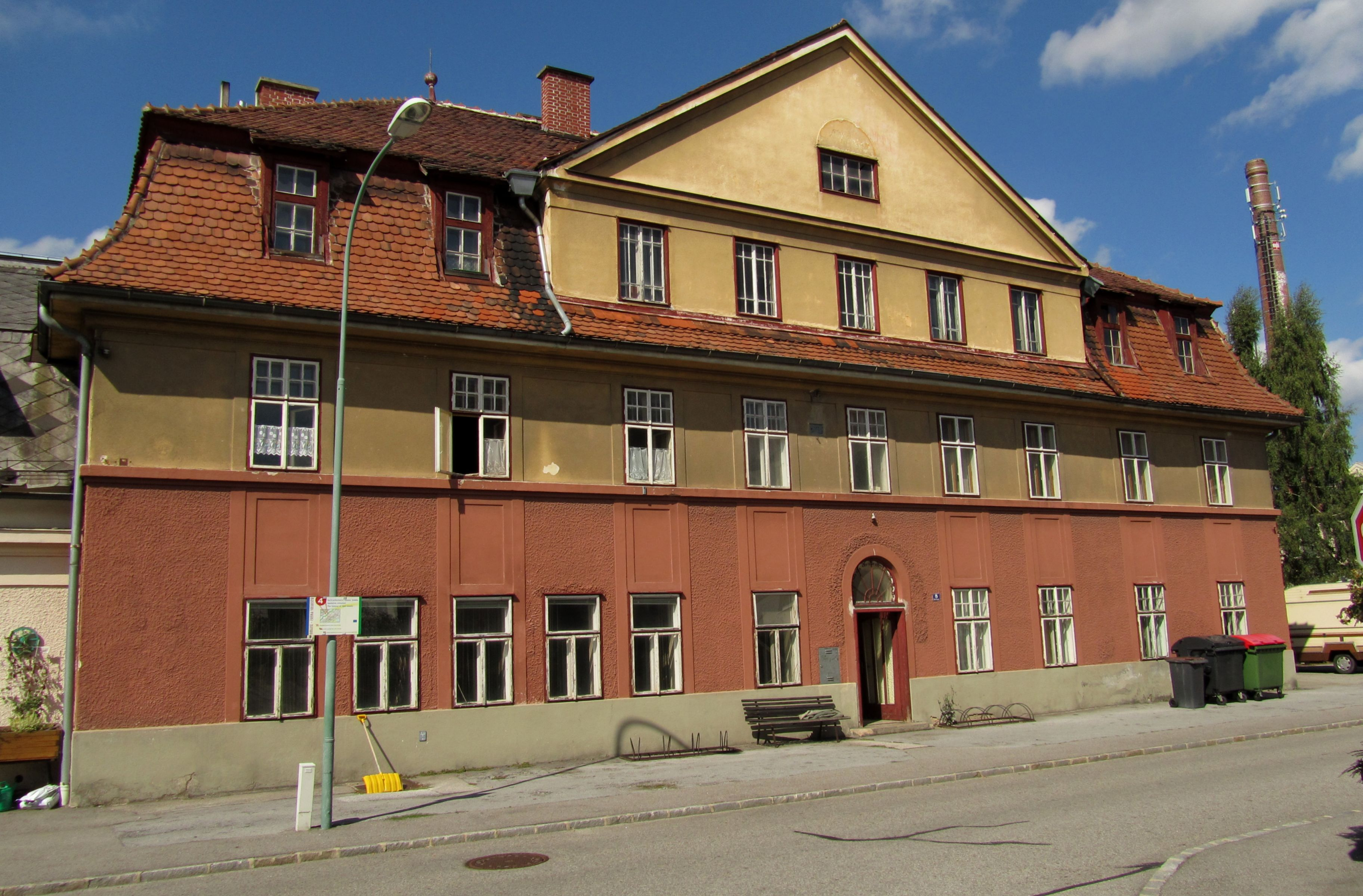 Wohnhaus